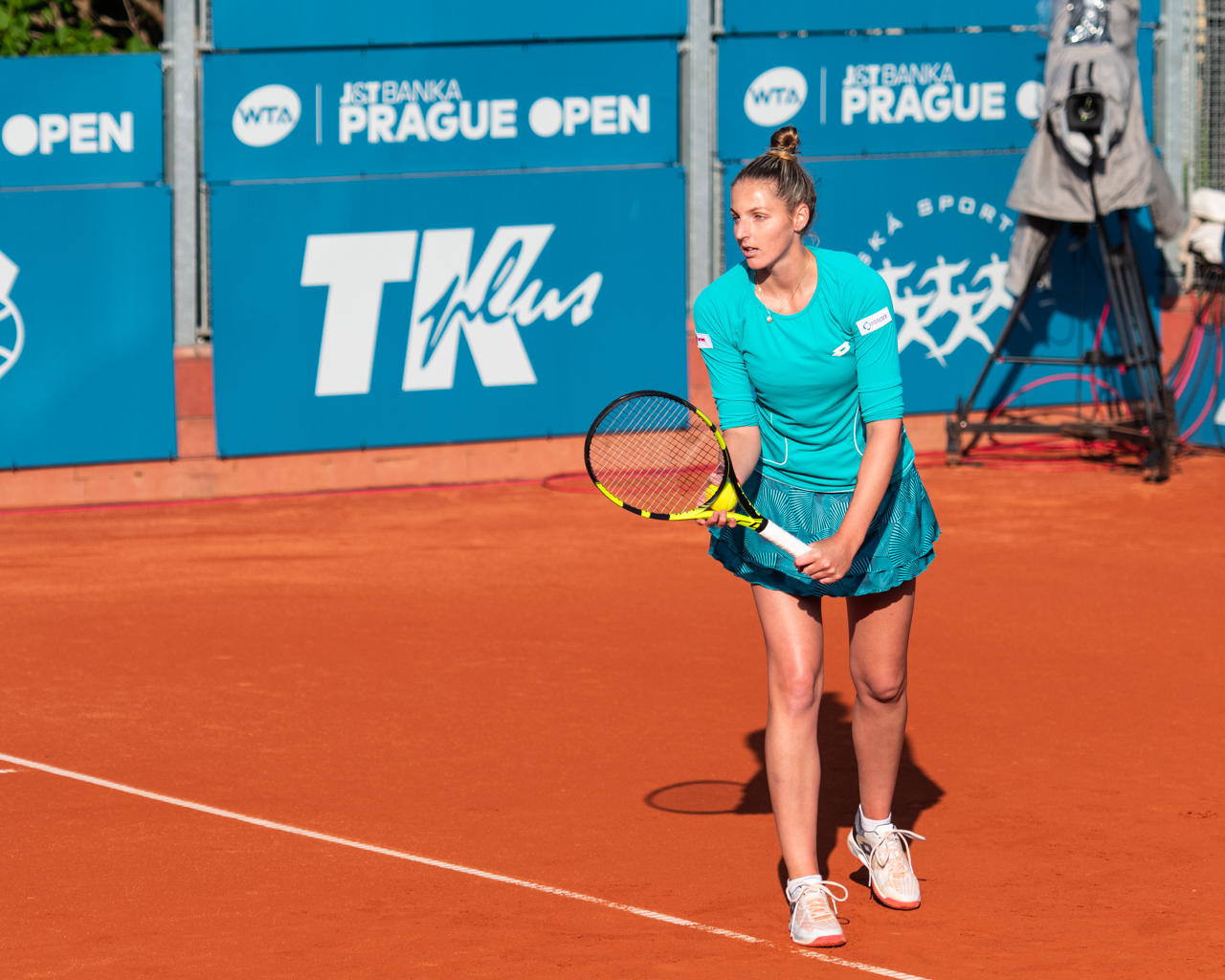 Kristýna Plíšková